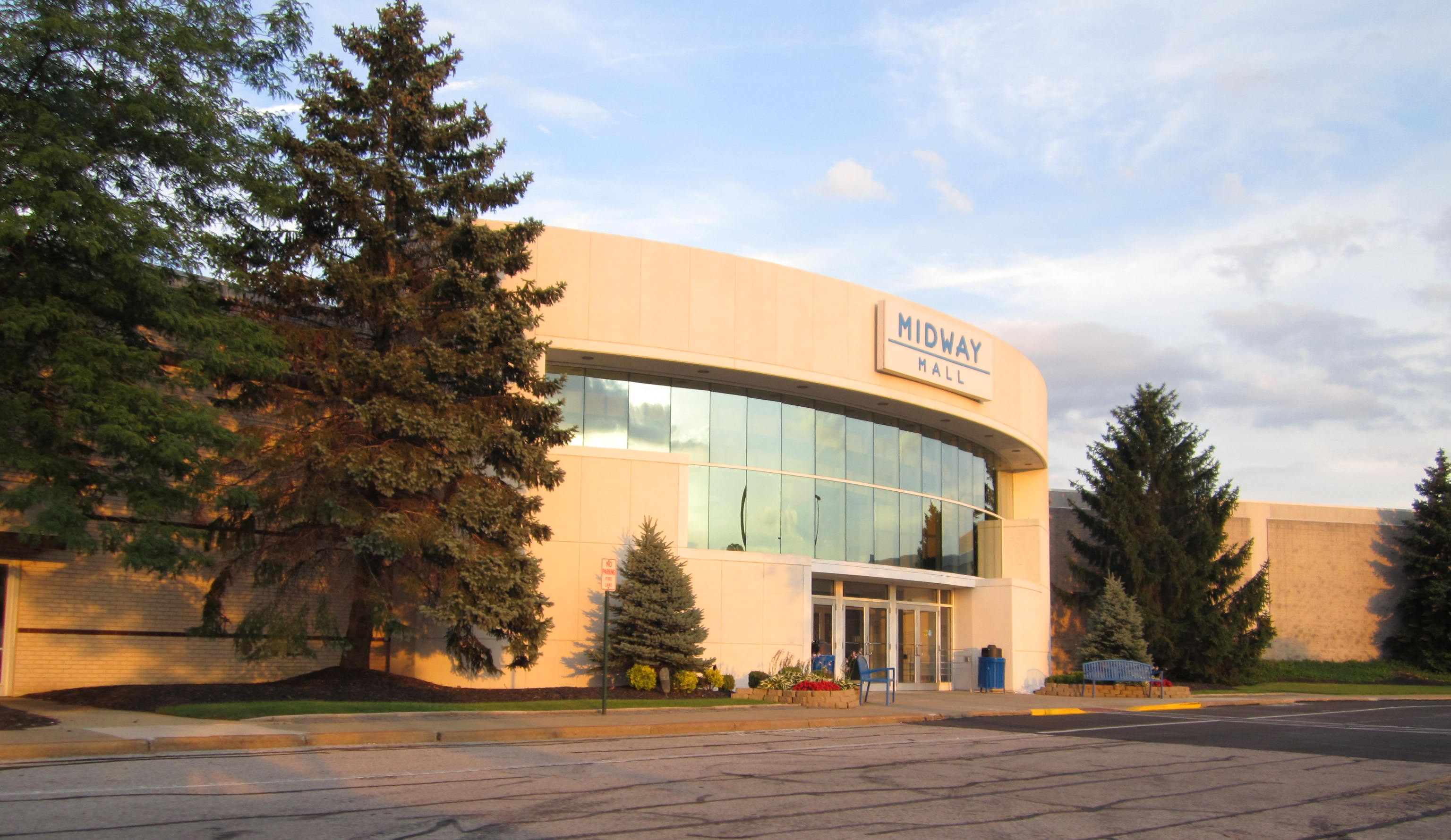 Midway Mall